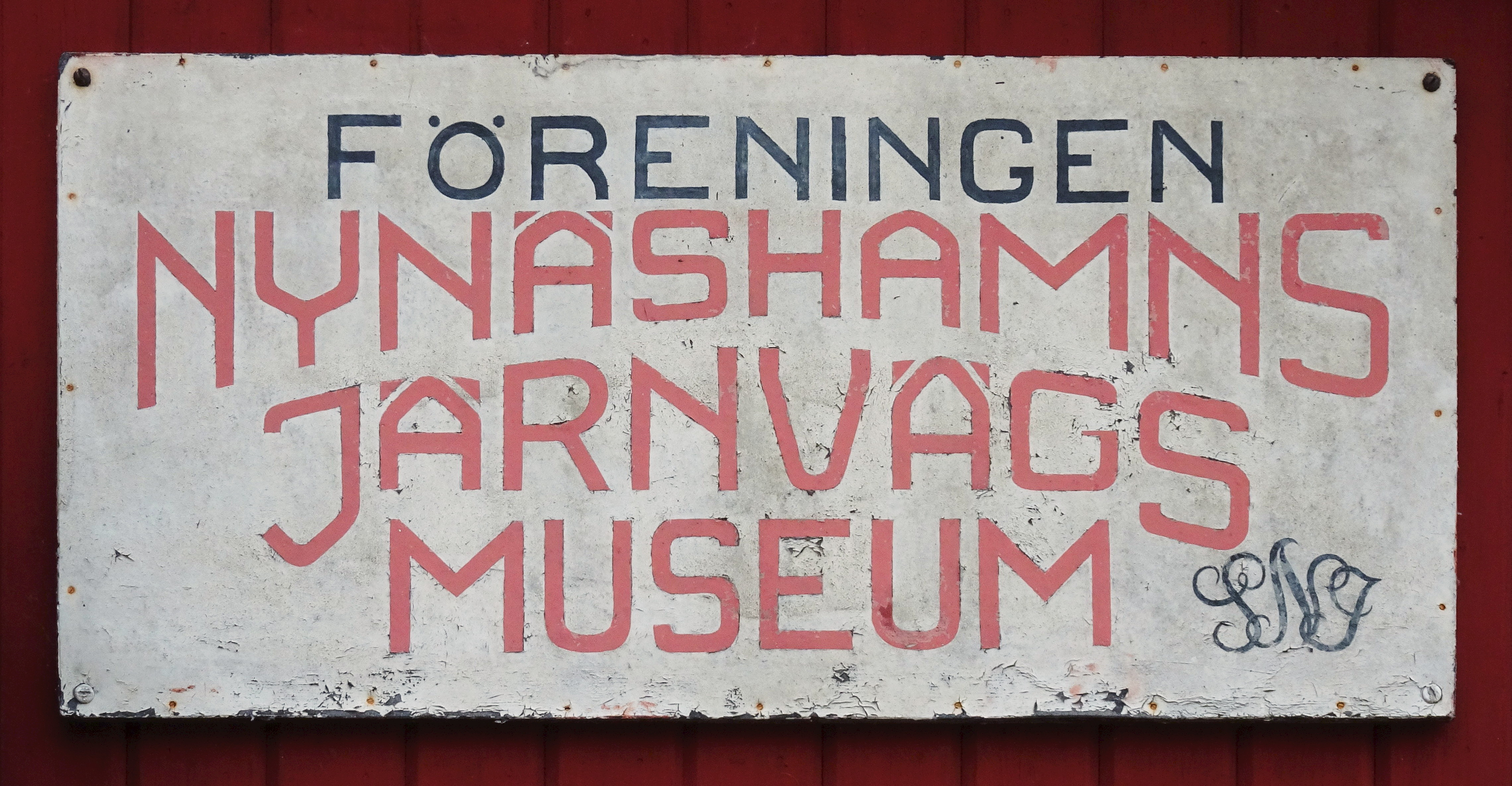 Nynäshamns järnvägsmuseum, skylt